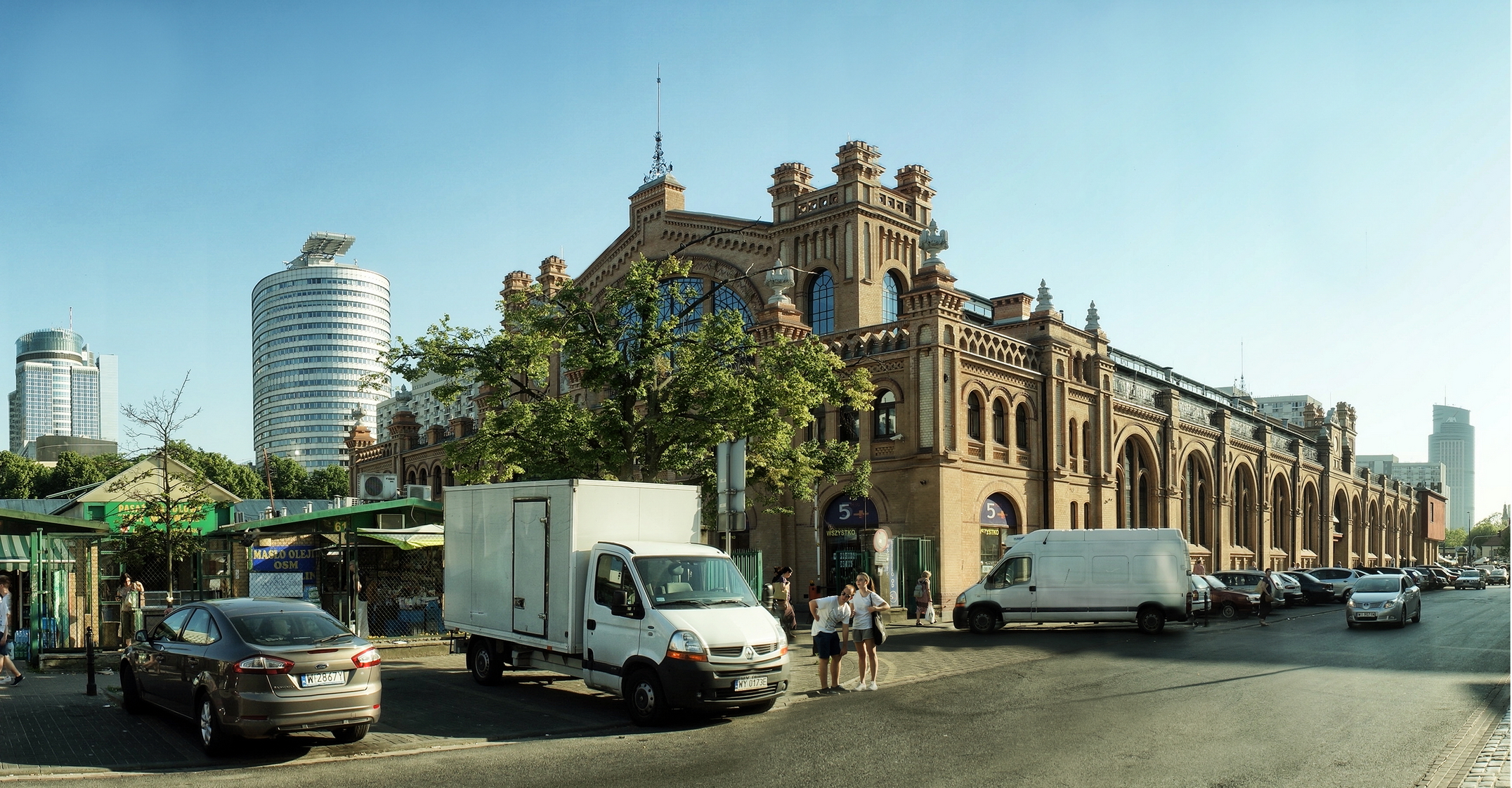 Hala Mirowska